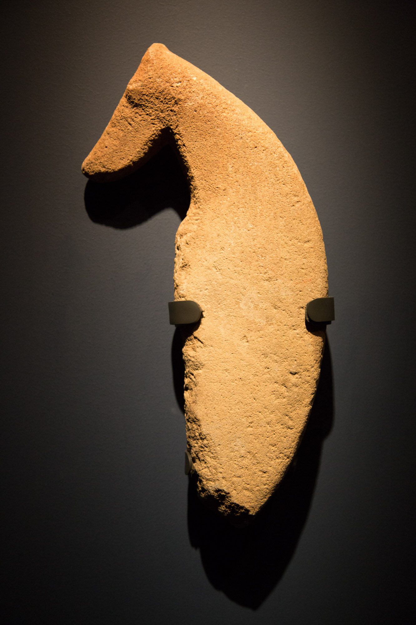 المقر - سلوقي - قطعة أثرية.